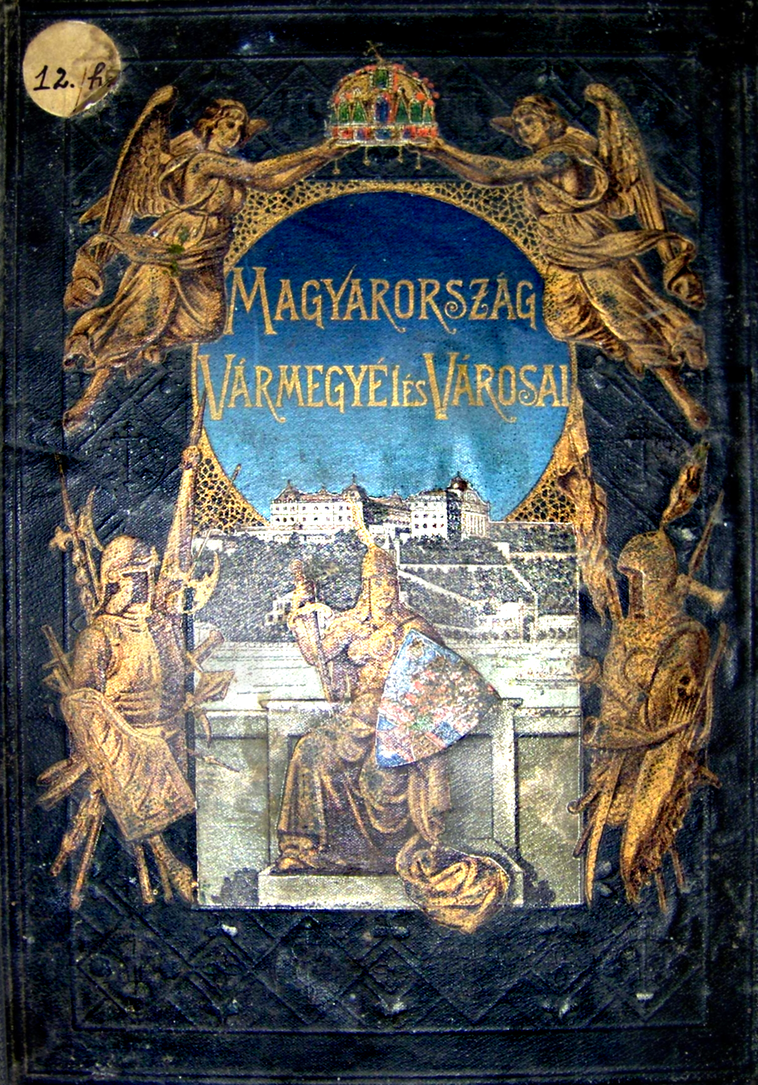 Hont vármegye és Selmeczbánya sz. kir. város , 1906 - könyvkönyvborító, forrás - Borovszky Samu- Magyarország vármegyéi és városai sorozat